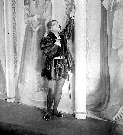 Ulvi Rajab as Hamlet. Azerbaijan State Dramatic Theater.